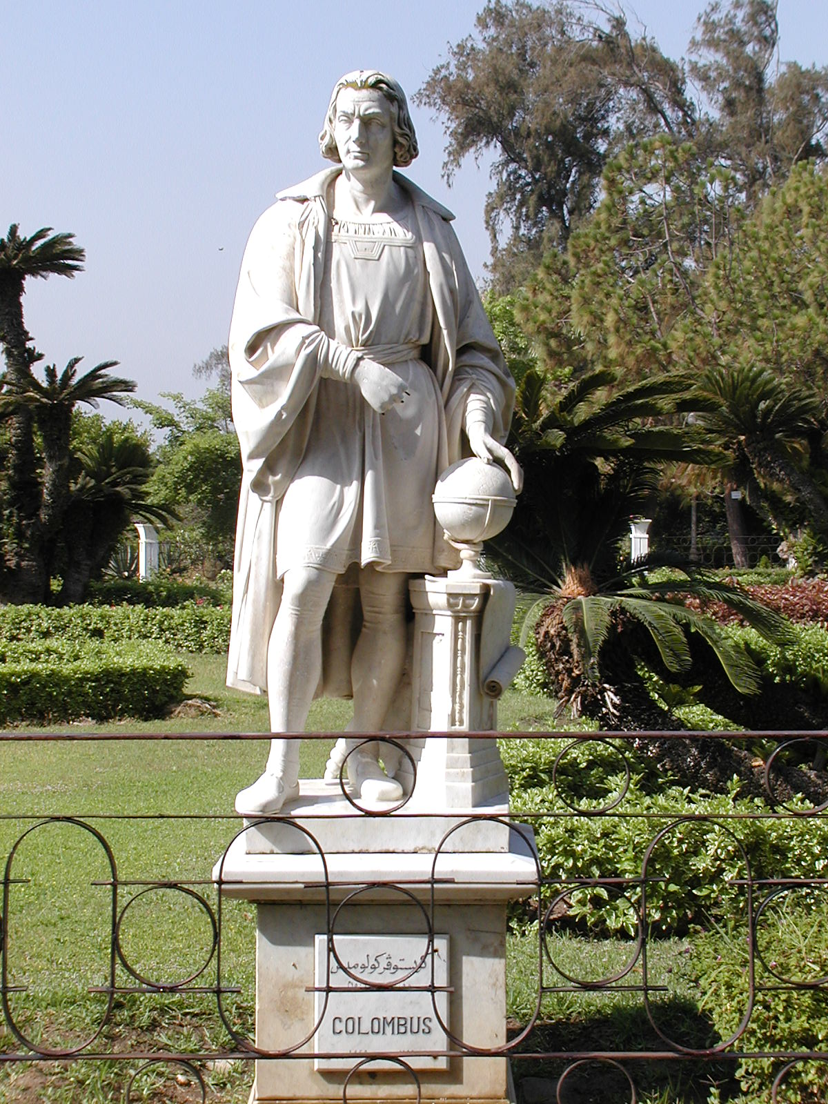 Parterre des navigateurs (Christophe Colomb) dans le parc du Palais d'Antoniadis, (Alexandrie, Égypte).